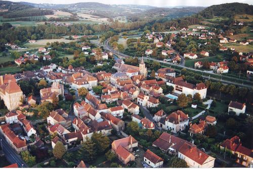 Vue aérienne de Siorac en Périgord